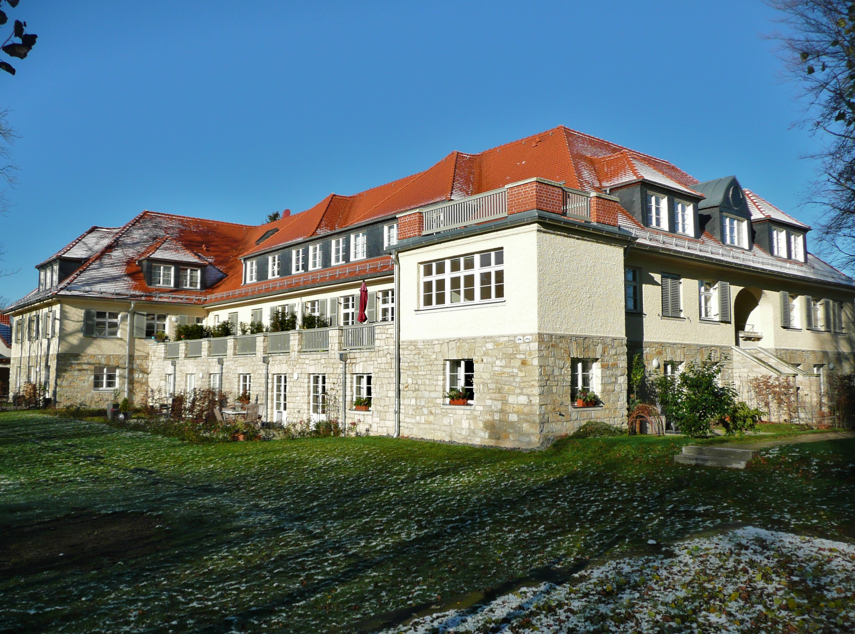 Ehemaliges Altenheim Hellerau Karl Liebknecht Straße; von 1911 bis 1915 Pensionat der Bildungsanstalt Jaques-Dalcroze; 1920 bis 1925 Schulgebäude der Neue Schule Hellerau; 1925 bis 1935 Töchterheim der Mathilde-Zimmer-Stiftung; ab 1935 bis 1992 Kantine der Kaserne; danach Leerstand; ab 2012 Umbau zum Wohnhaus